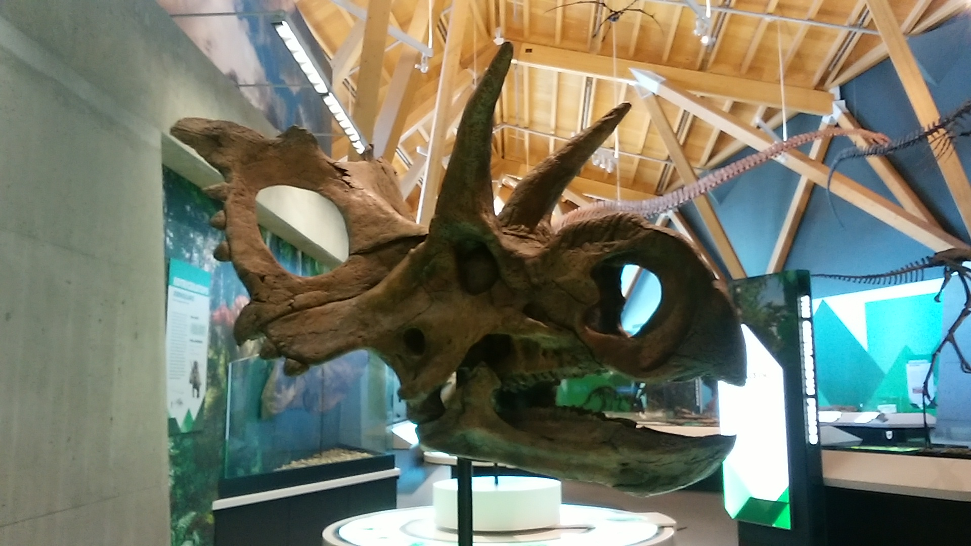 ゼノケラトプス・フォレモステンシス（フィリップカリー博物館所蔵）